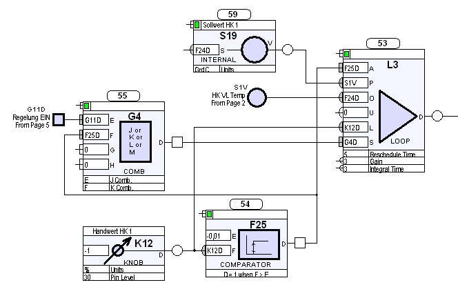 Kleiner Ausschnitt aus einem Beispiel DDC Programm. Die Programmierung vieler DDC erfolgt auf grafische Weise, indem Module in einem Arbeitsbereich zugefügt werden. Die Ein- und Ausgänge dieser Module werden anschließend miteinander verbunden und bilden dann das Programm.